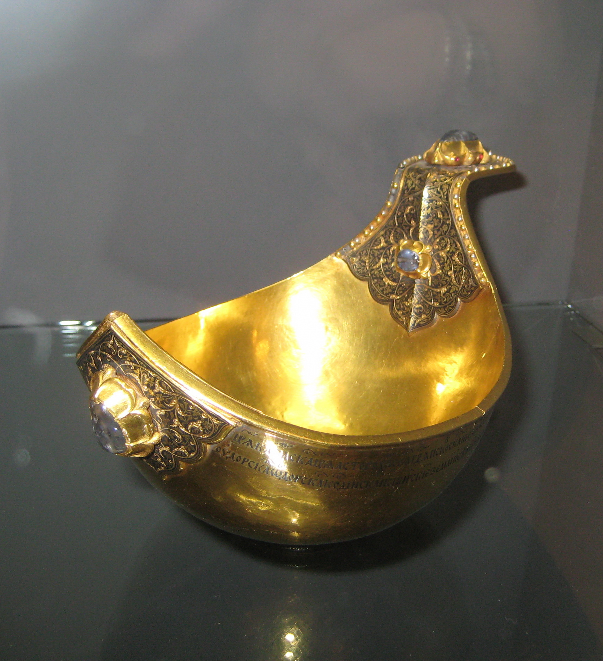 Ковш. Царские мастерские. Москва, после 1563 Золото, чернение, сапфиры, рубины, жемчуг. Государственные художественные собрания Дрездена. Подарен Петром Первым курфюрсту саксонскому Августу. Выставка «Русские и немцы: 1000 лет истории, искусства и культуры» (ГИМ)